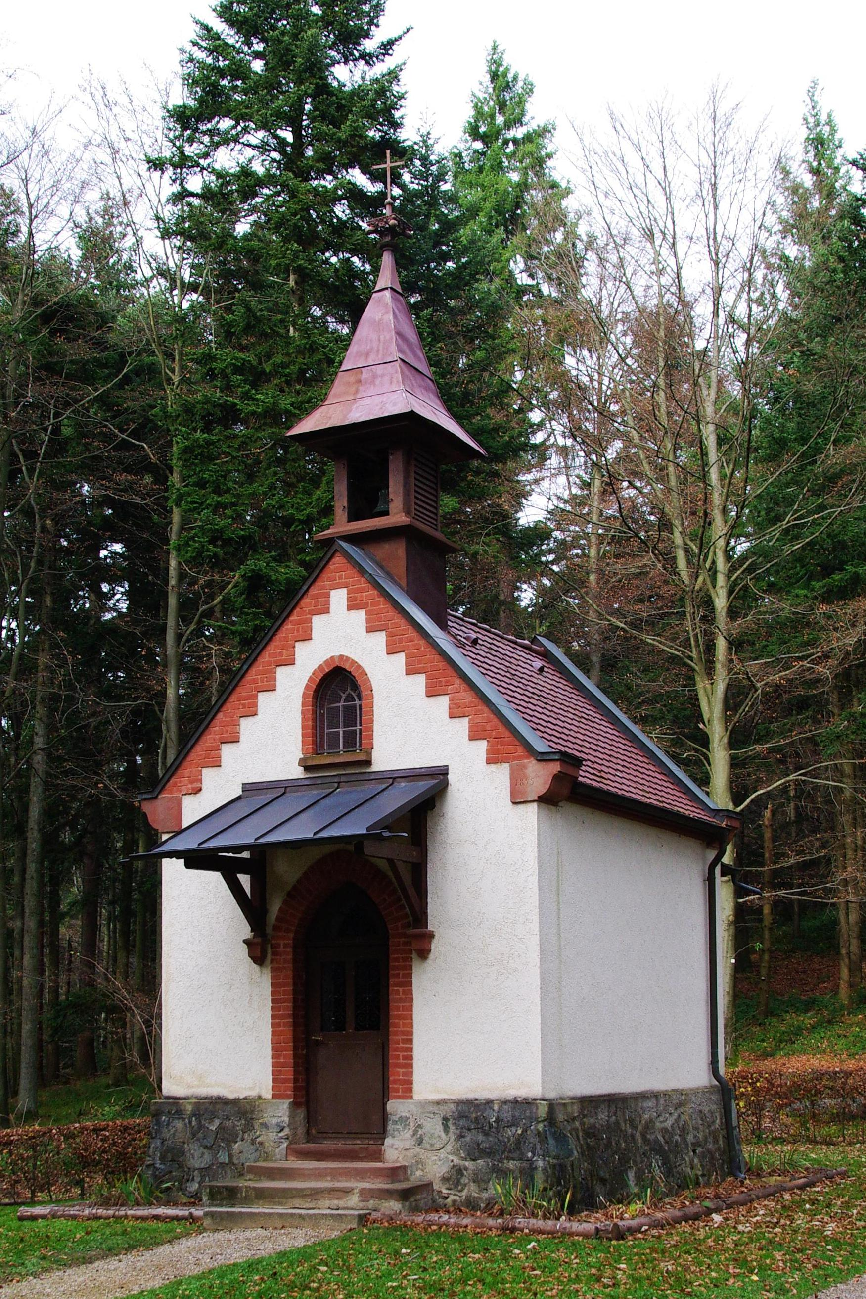 St. Wendelin (Freiburg) Der Eingang